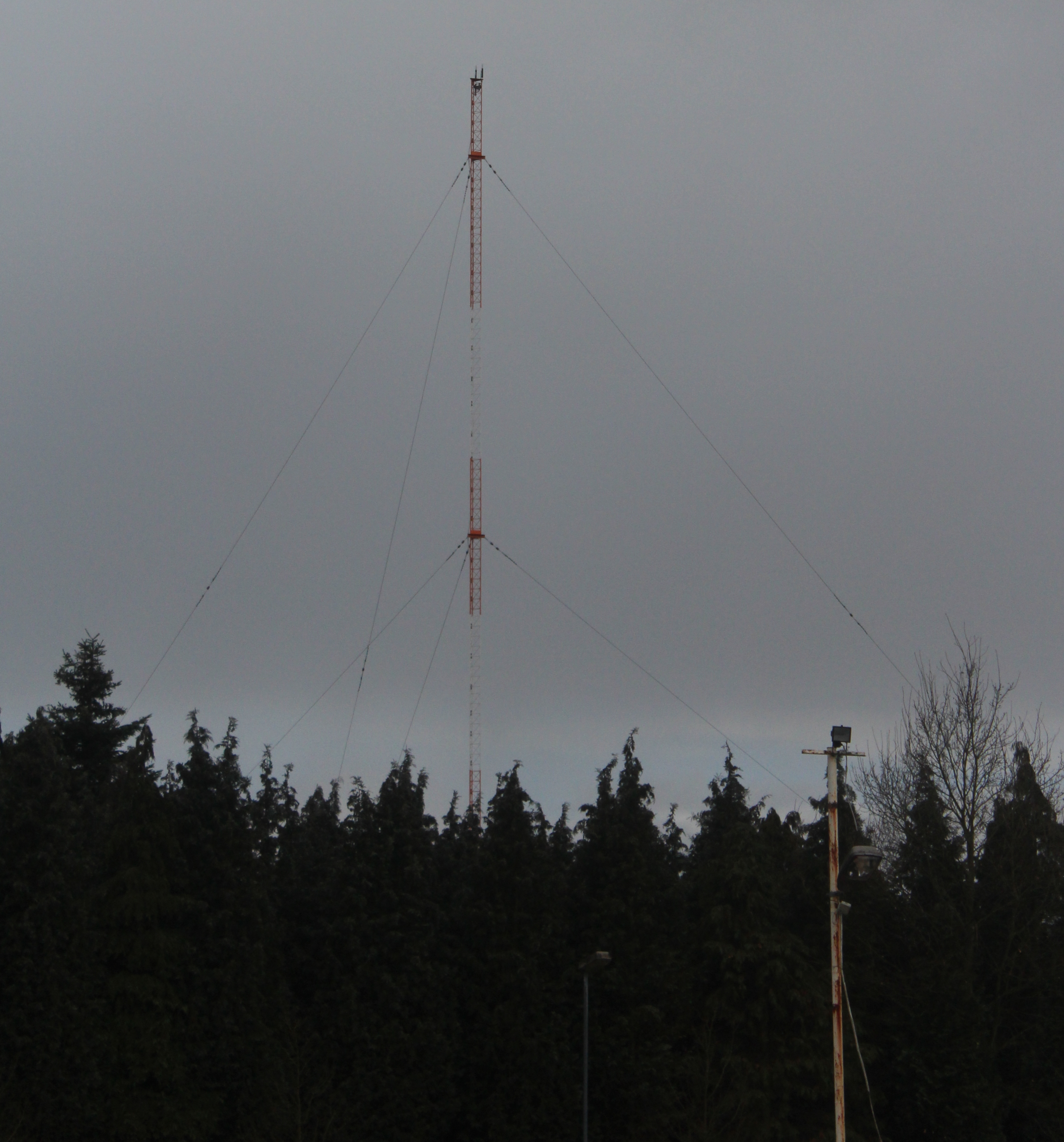 Sendemast des AFN-Mittelwellensenders Mönchengladbach